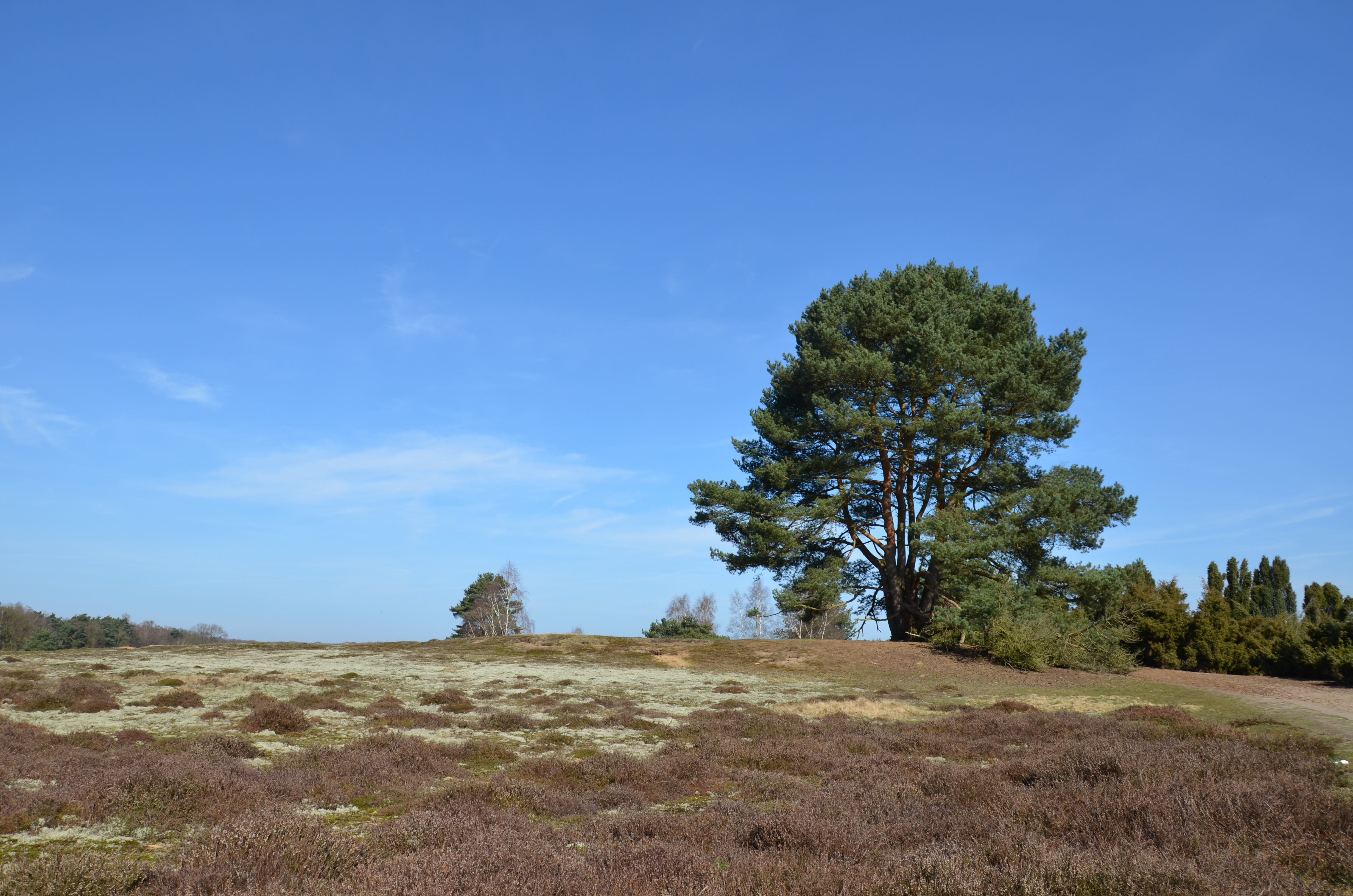 Westruper Heide in Haltern am See